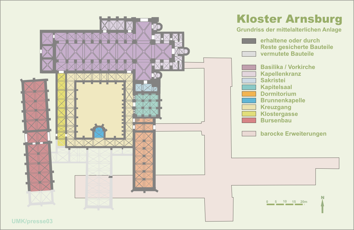 Grundriss der mittelalterlichen Bauteile von Kloster Arnsburg, Hessen, Germany